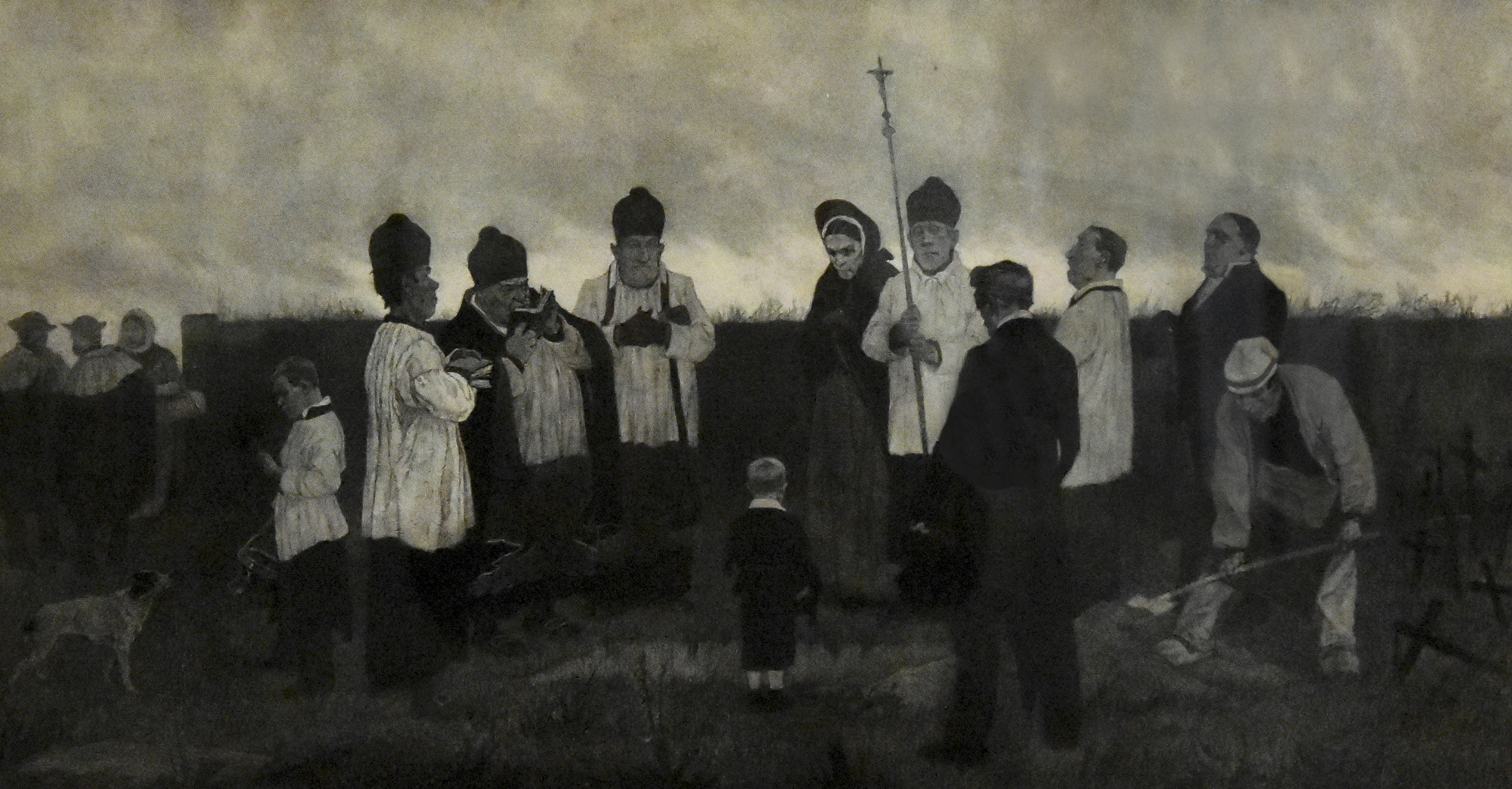 Félicien Rops (1833-1898) Een begrafenis in het Waalse land (1863) litho - Musée Félicien Rops Name